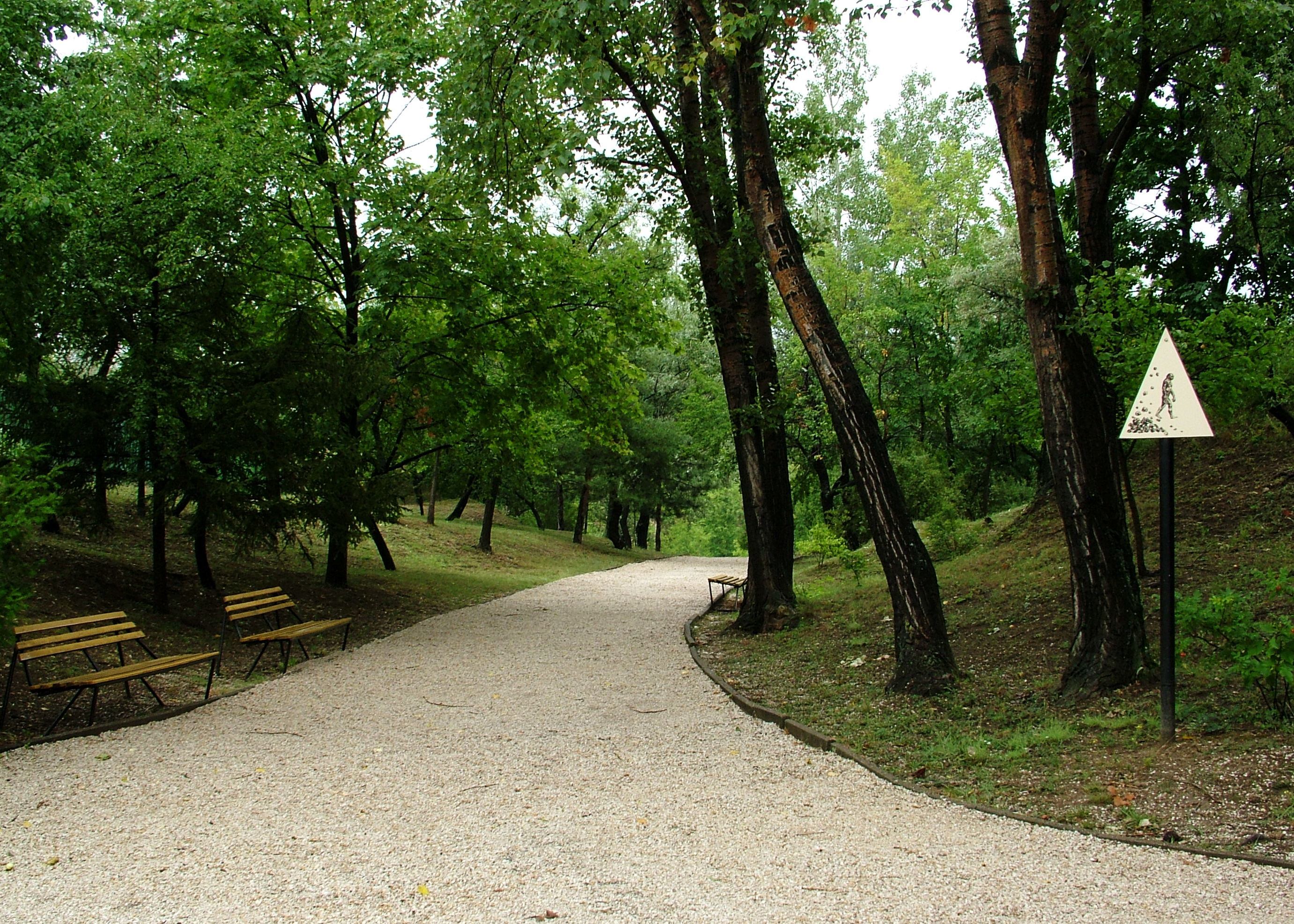 Őskori telep parkja (Vértesszőlős Őstelep)